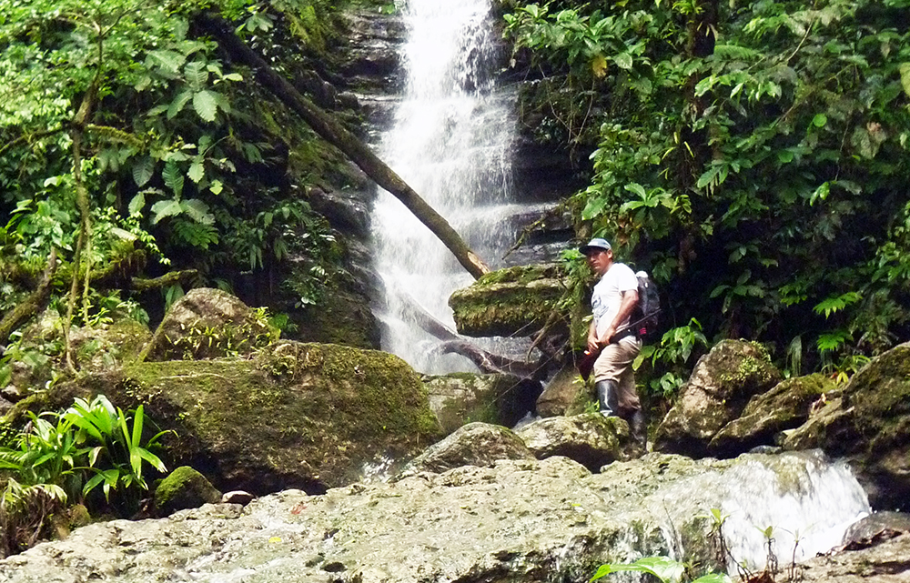 En la cascada Agua Dulce